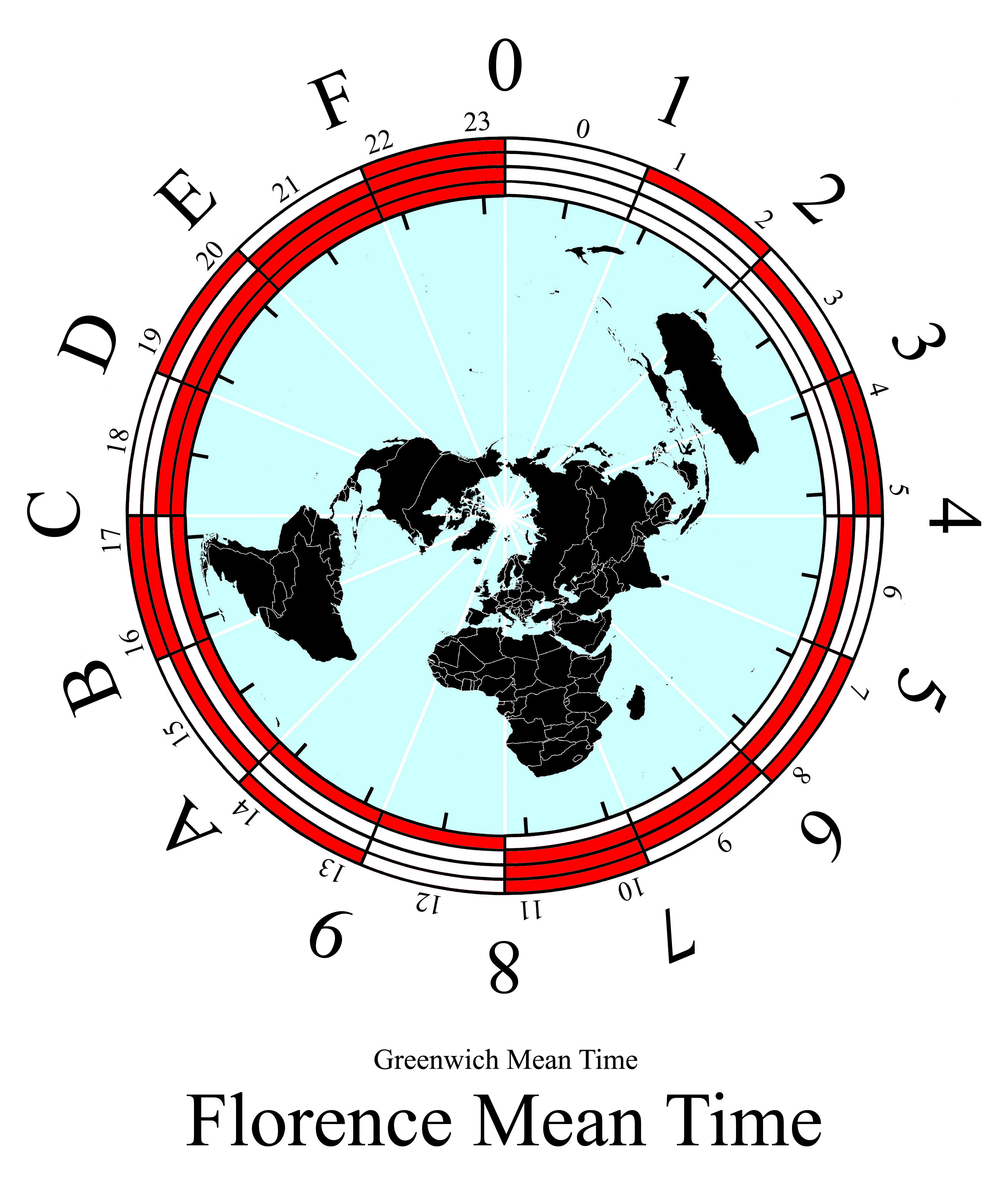 Hexadecimal clock